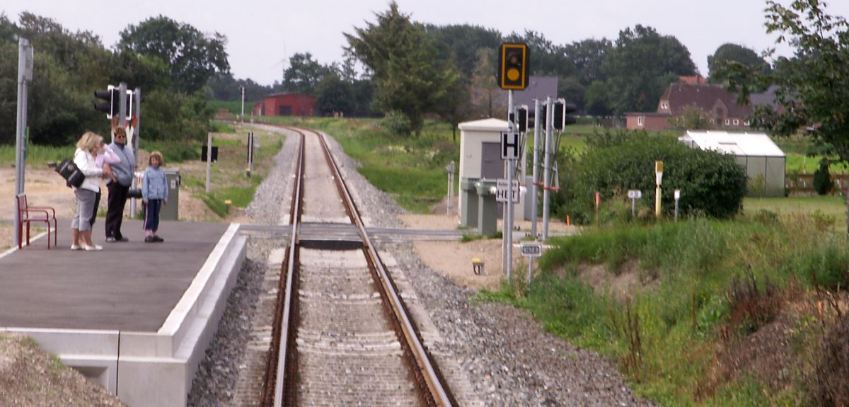 Eiderstd. Bahn